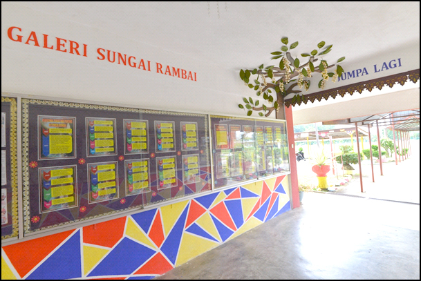 sejarah sungai rambai